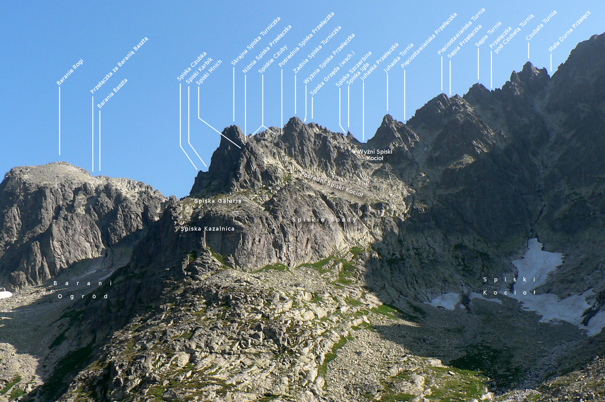 Masyw Spiskiej Grzędy i dalsza część grani Wyżniego Baraniego Zwornika - podpisane obiekty. Widok z Doliny Pięciu Stawów Spiskich